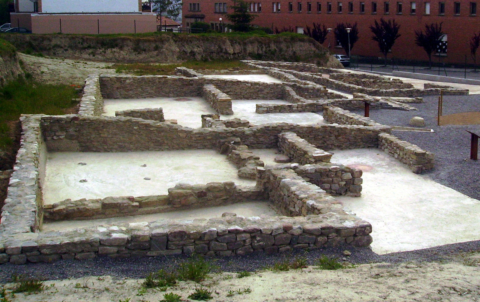 Vista del jaciment del Camp de les Lloses (Tona, Osona)